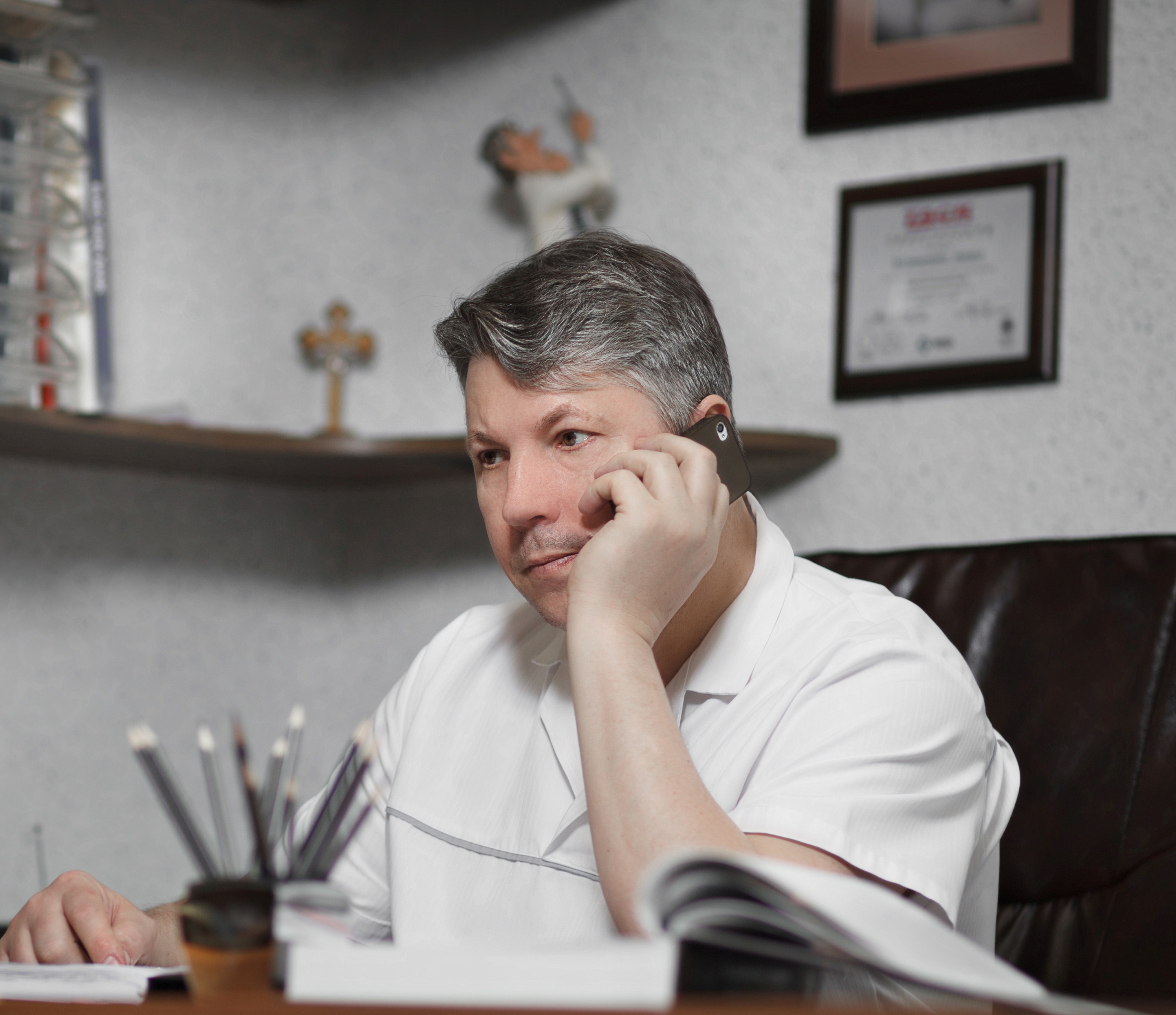 Сергей Владимирович Слесаренко говорит по телефону